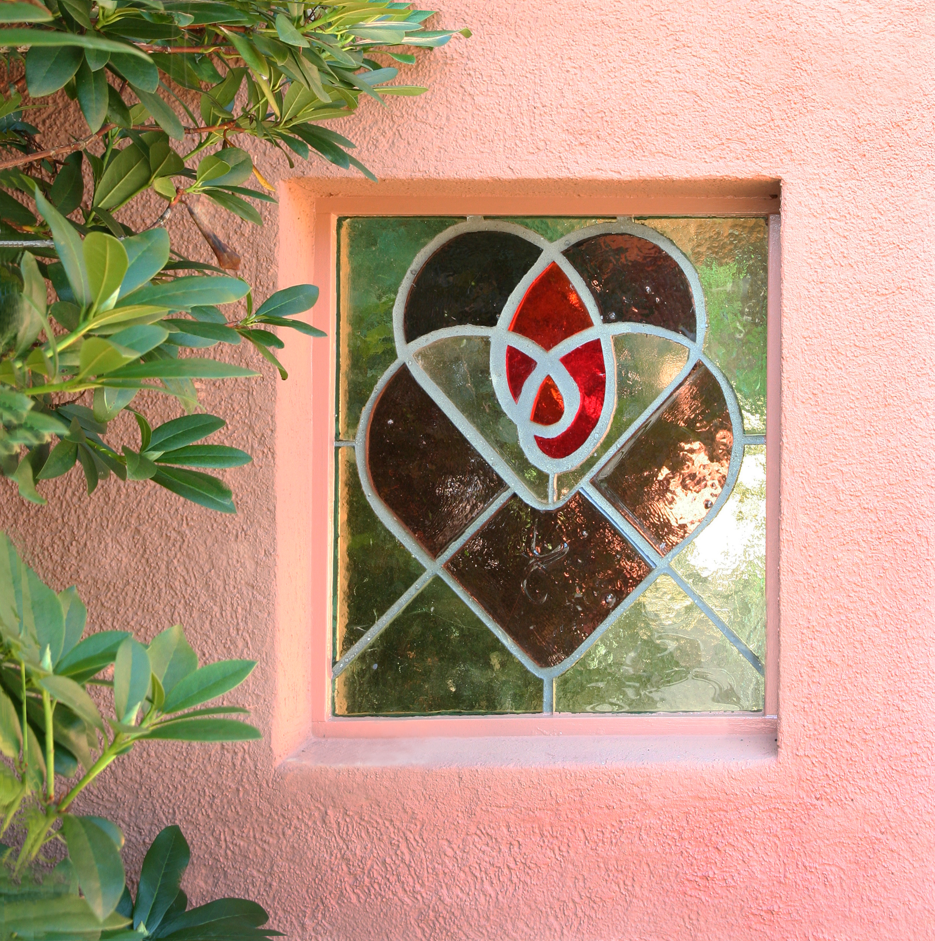 Römisch-katholische Pfarrkirche Herz Jesu Hausen am Albis, Glasfenster im Aussenbereich